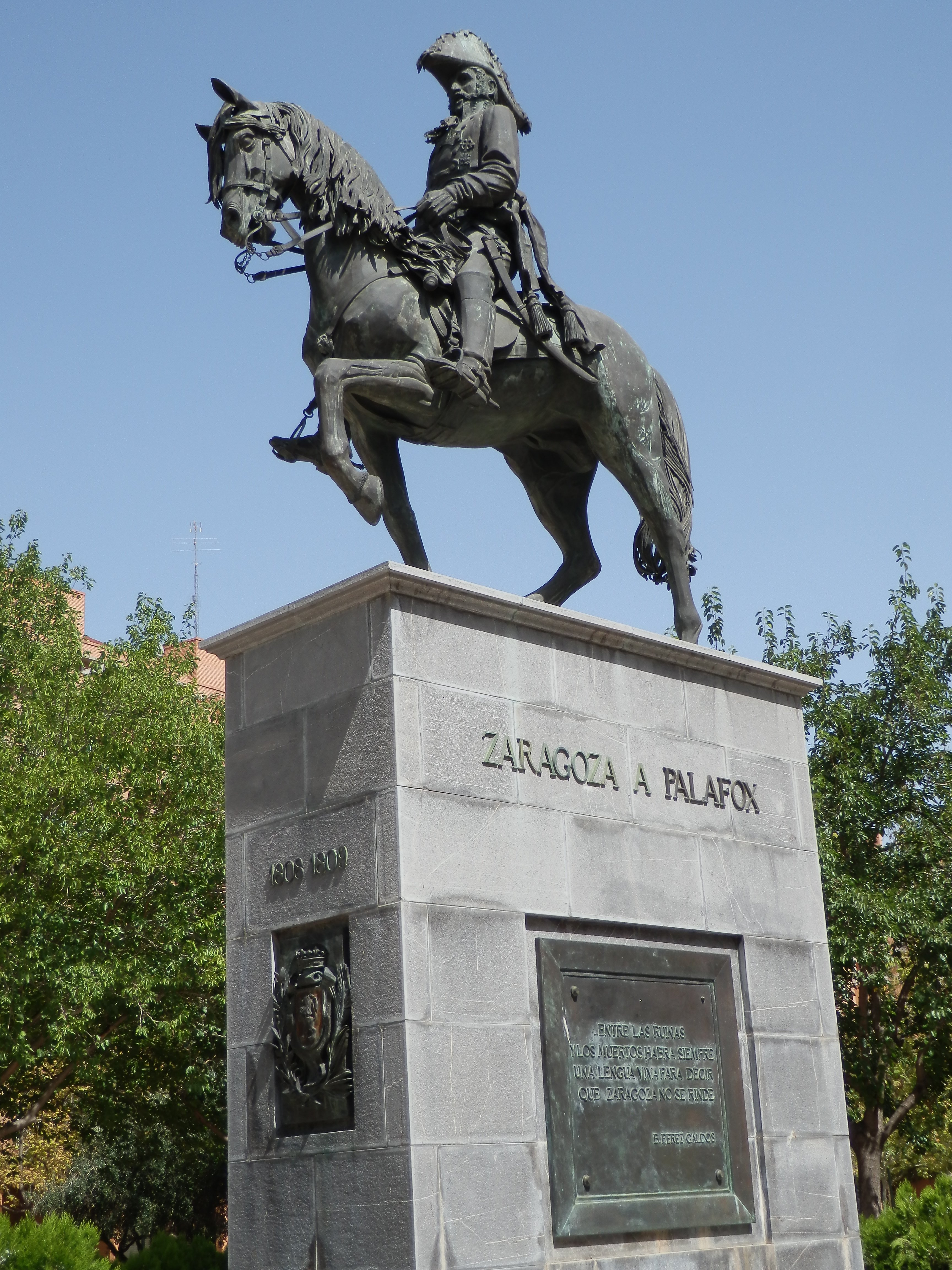 Estatua de José Palafox y Melci en la plaza José María Forqué de Zaragoza, España.